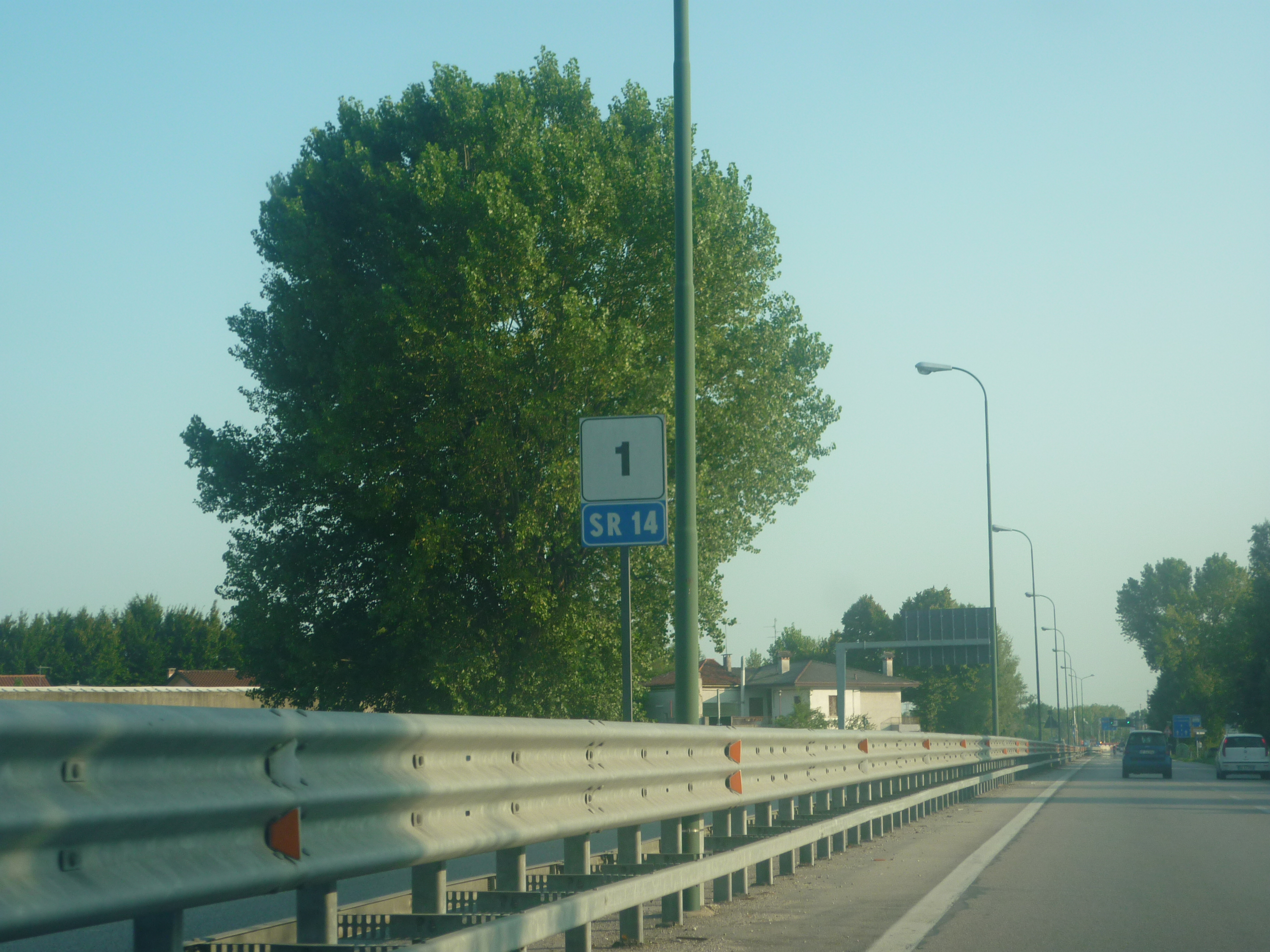 SR14-ex SS14Bis